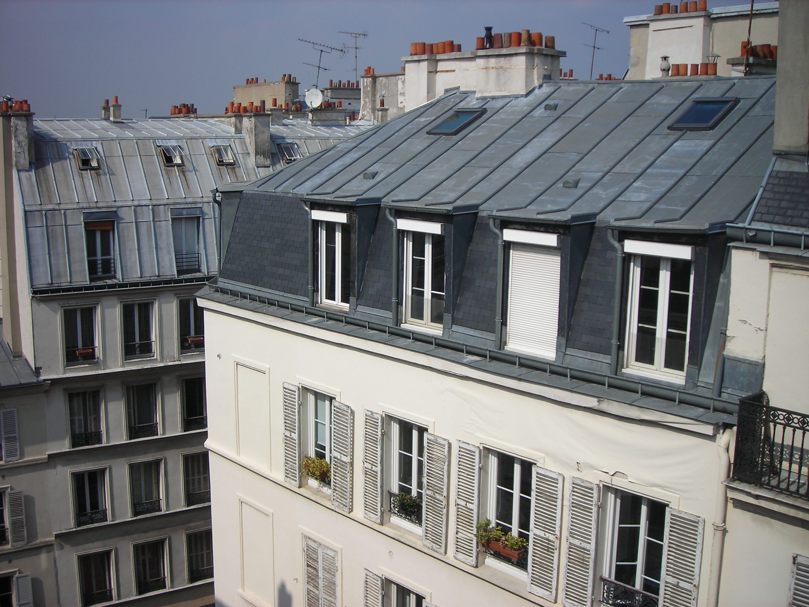 Immeuble de Paris